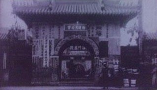 天妃慈灵宫旧影